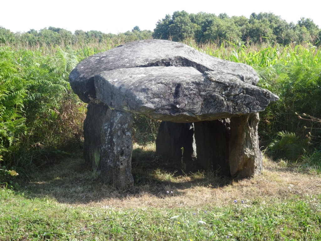 Dolmen de La Croix-du-Breuil